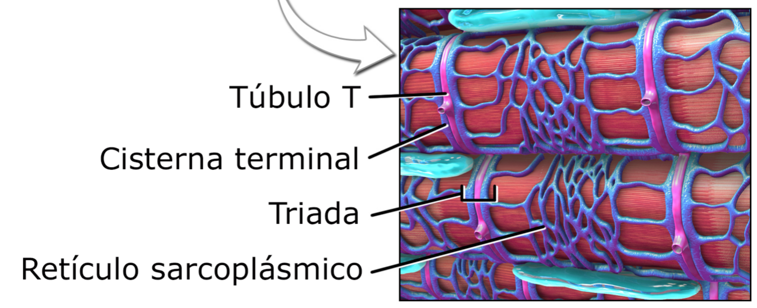 Triada: túbulo T y retículo sarcoplasmático.